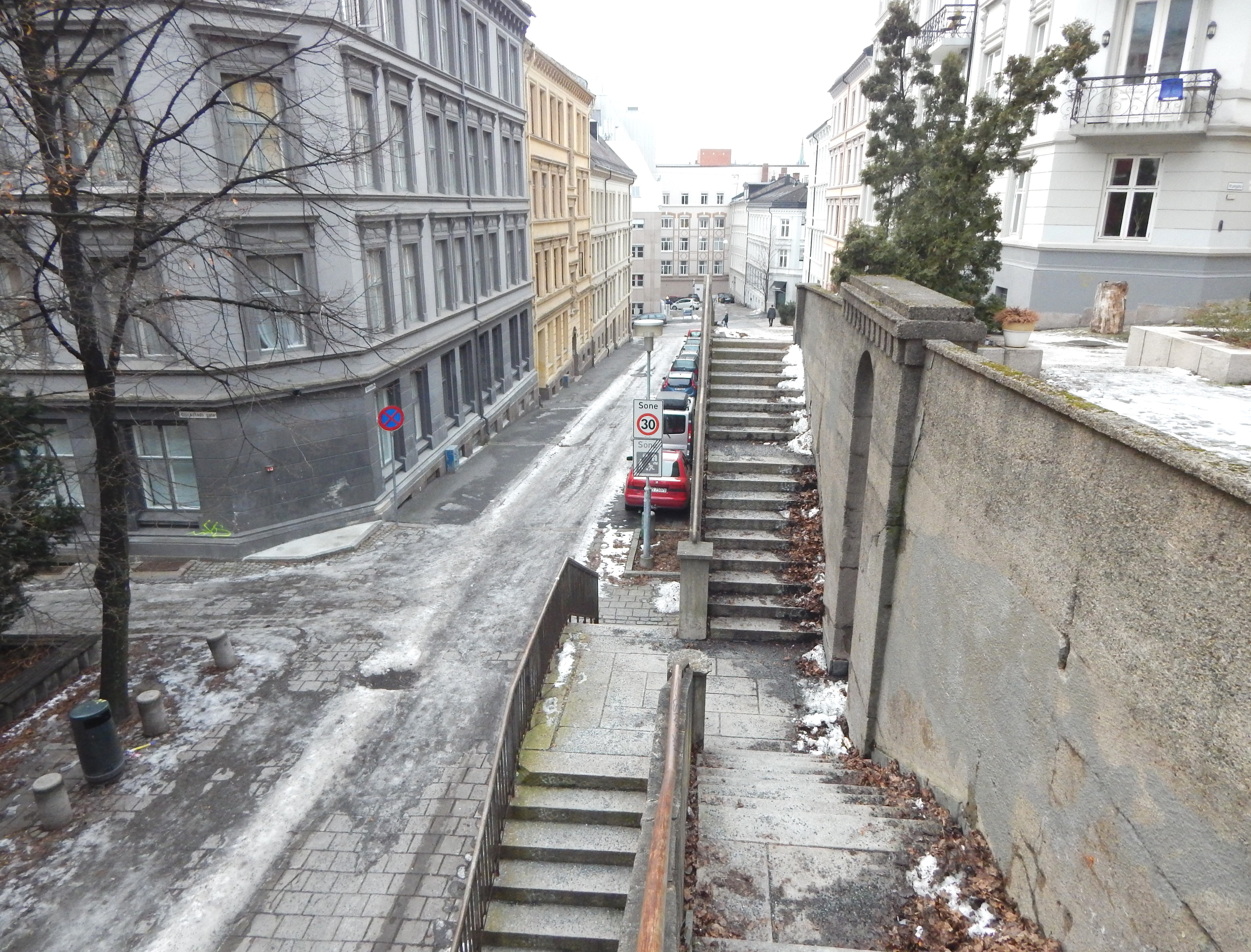 Trapper forbinder de to høydenivåene i Dovregata (og Glückstads gate).